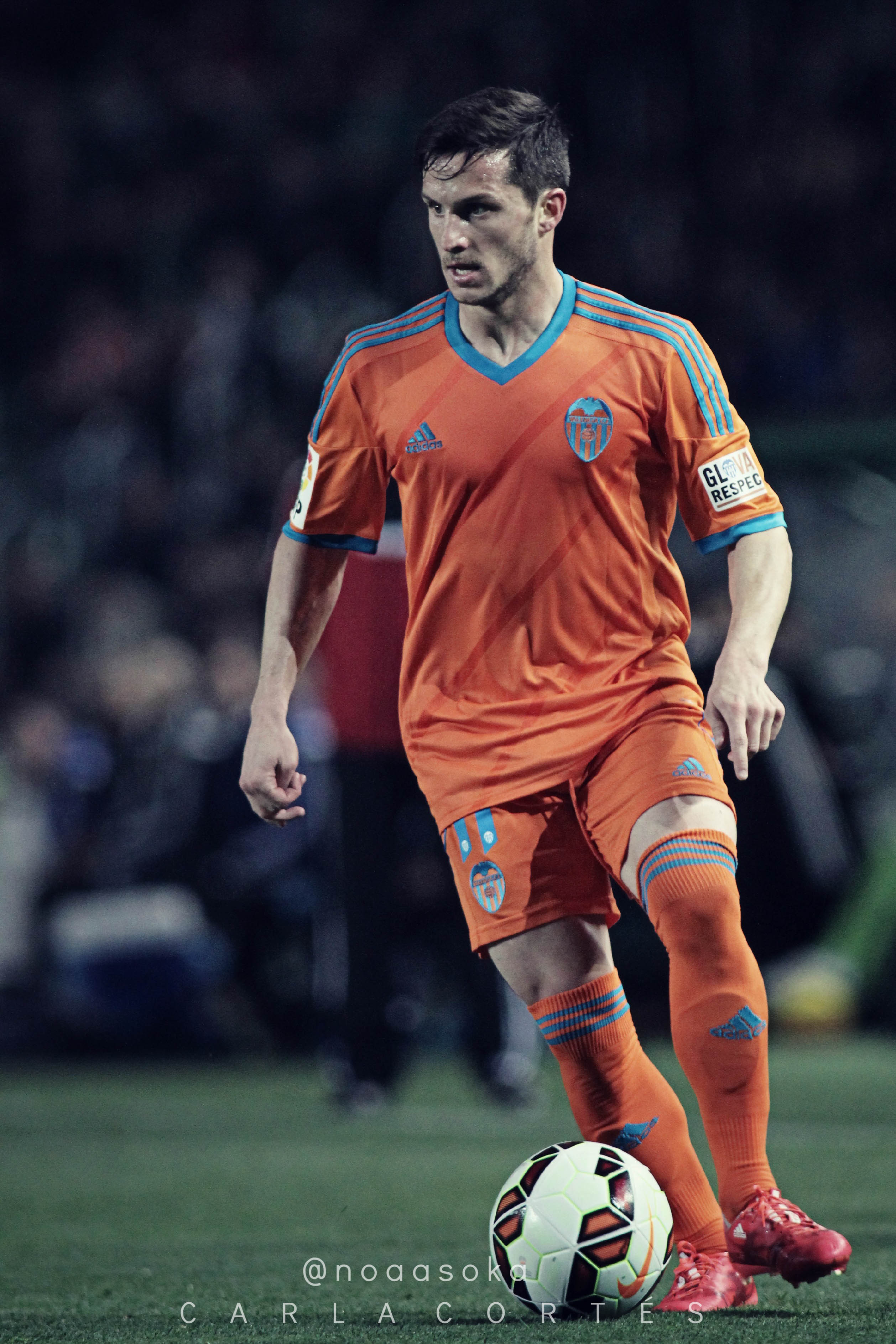 Pablo Piatti playing for Valencia CF in 2015Fotografía: Carla Cortés / @noaasoka